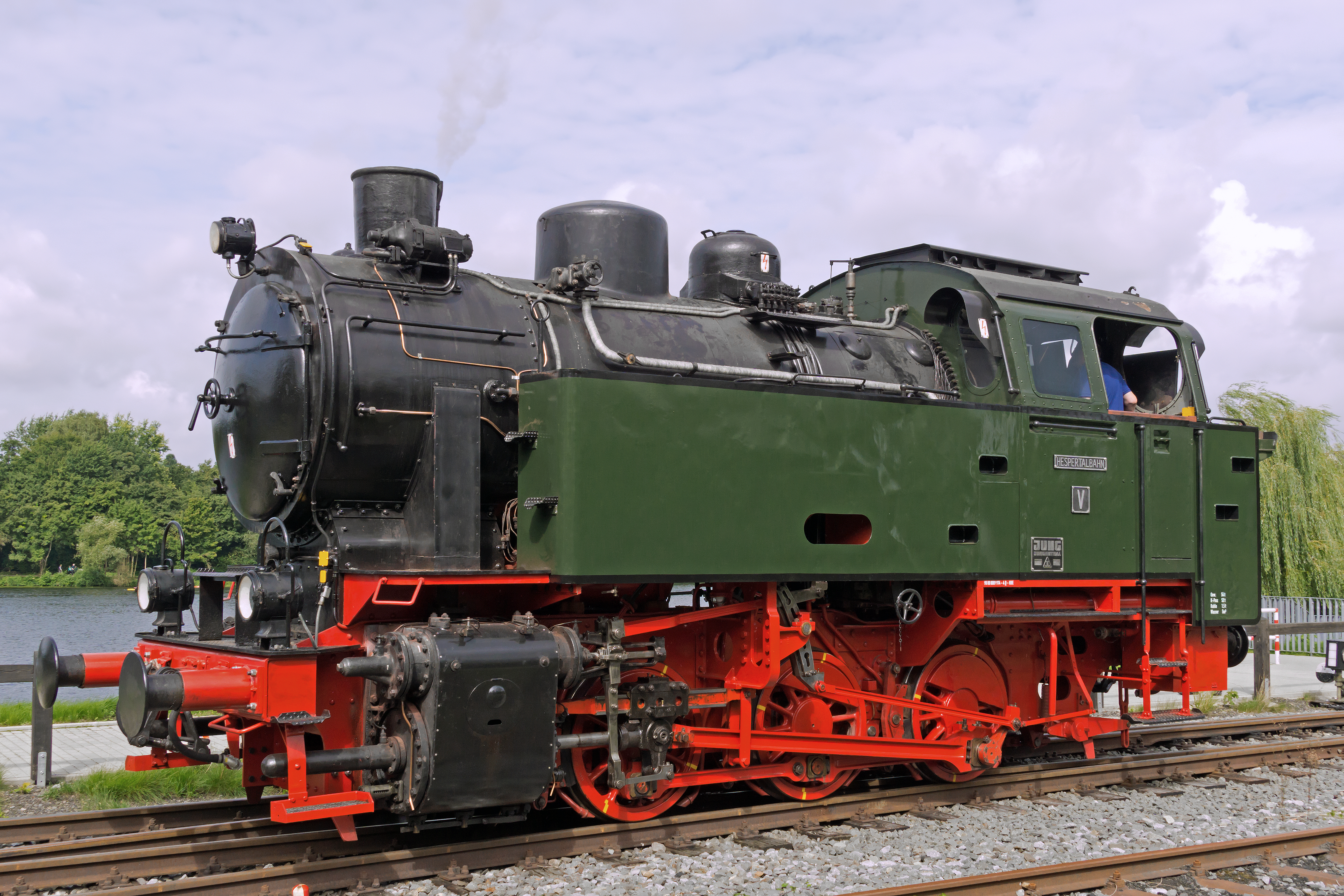 Dampflok Nr. V der Hespertalbahn am 20. August 2017 in Essen-Kupferdreh. Die Maschine gehört zum Typ "CNTL 560 PS" der Firma Arnold Jung, Fabriknr. 12037, Baujahr 1954.